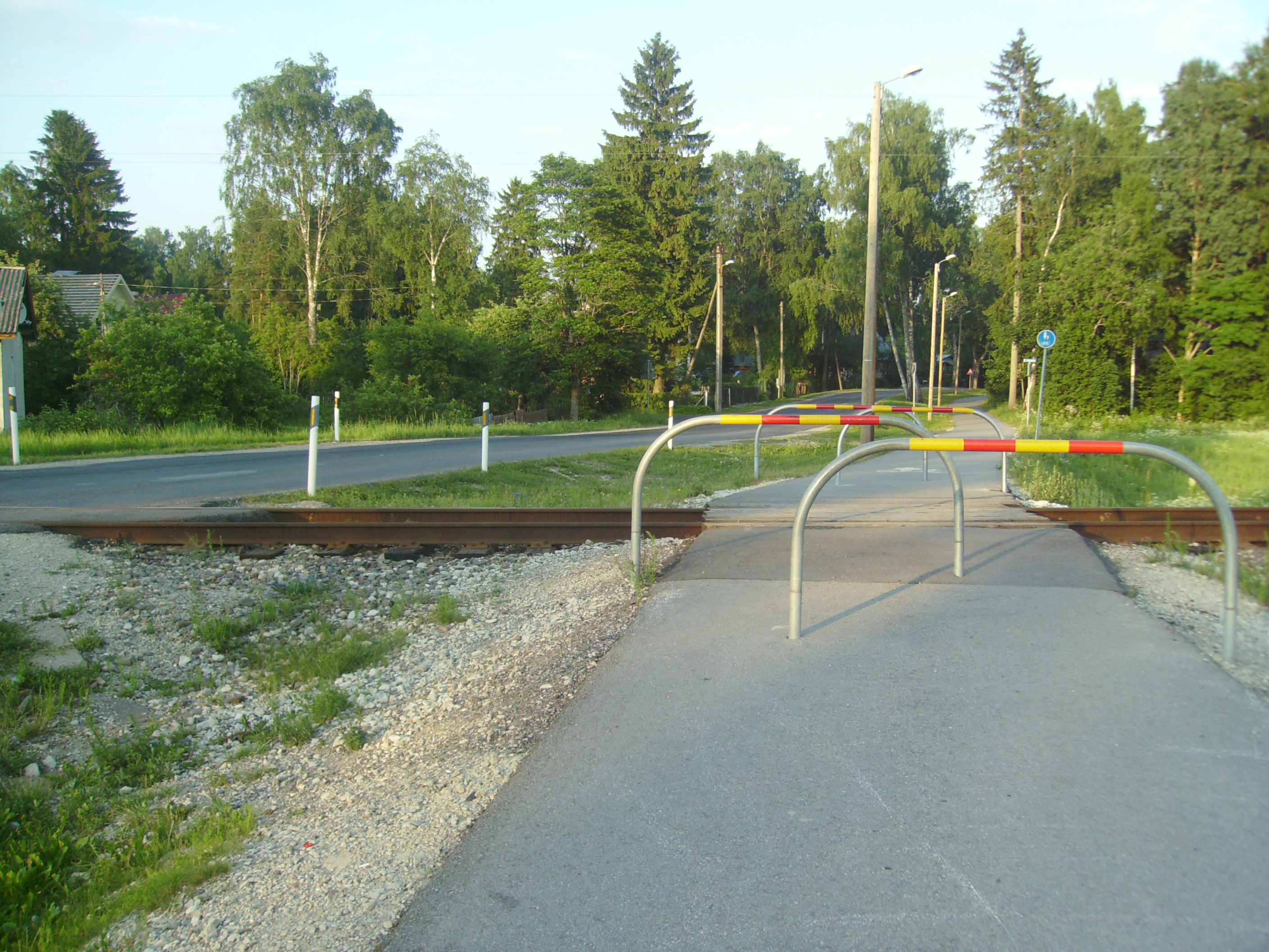 Кийза.